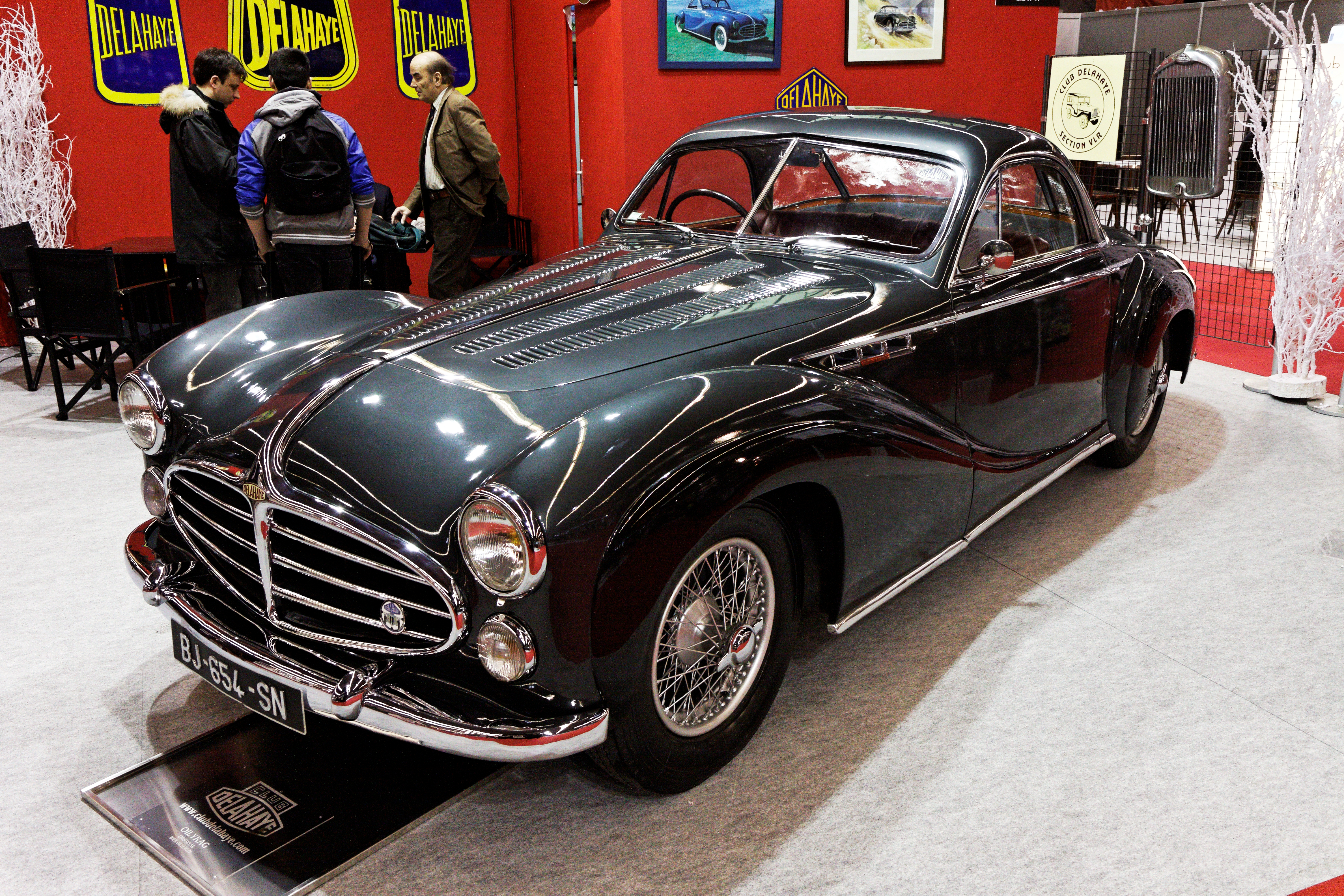 Une Delahaye 235 présentée lors du salon Retromobile 2013.